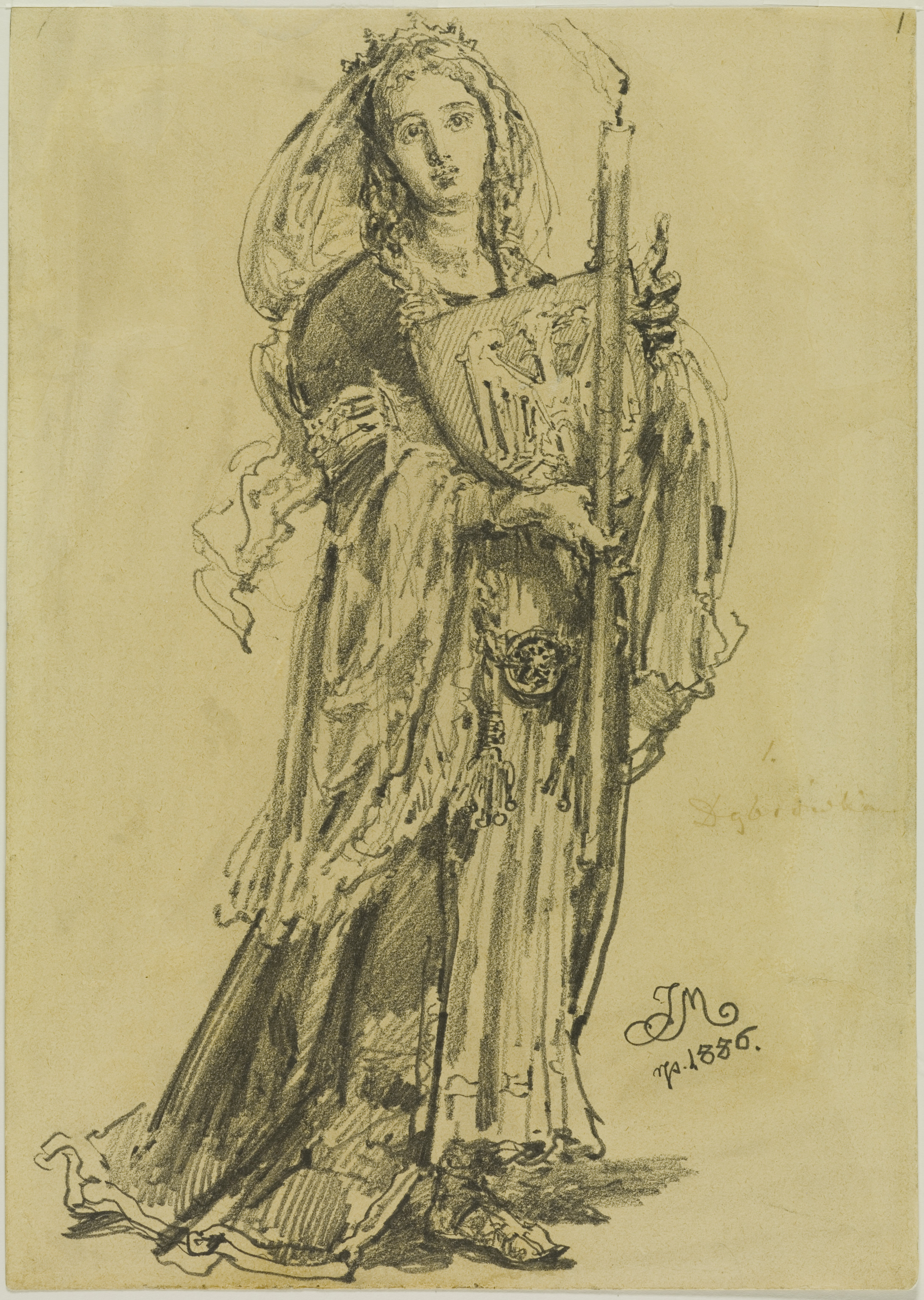 Dąbrówka